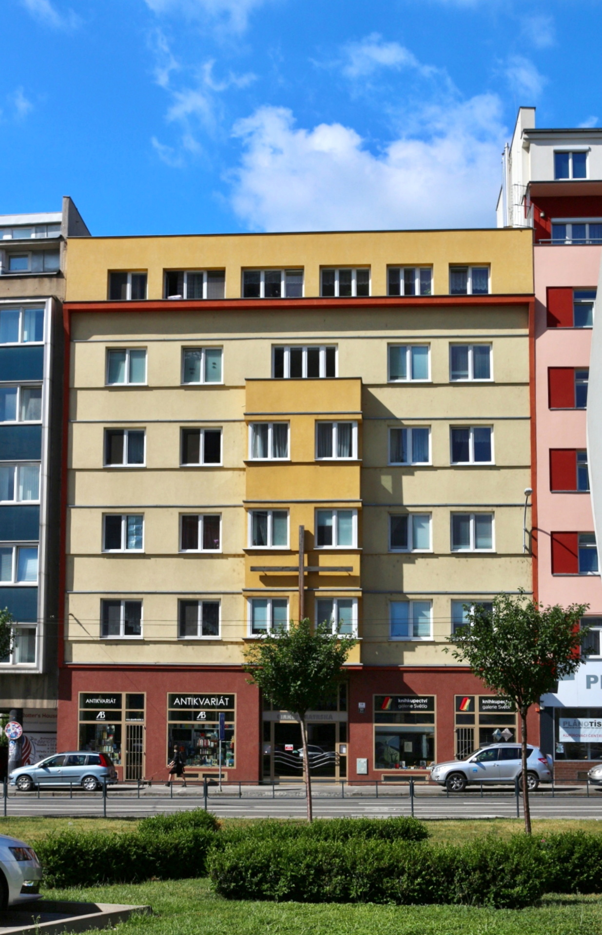 Modlitebna Církve bratrské v Brně-Veveří